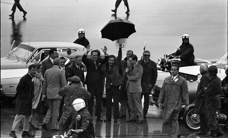 Recién llegado a Ezeiza, Perón bajo el paraguas de José Ignacio Rucci.